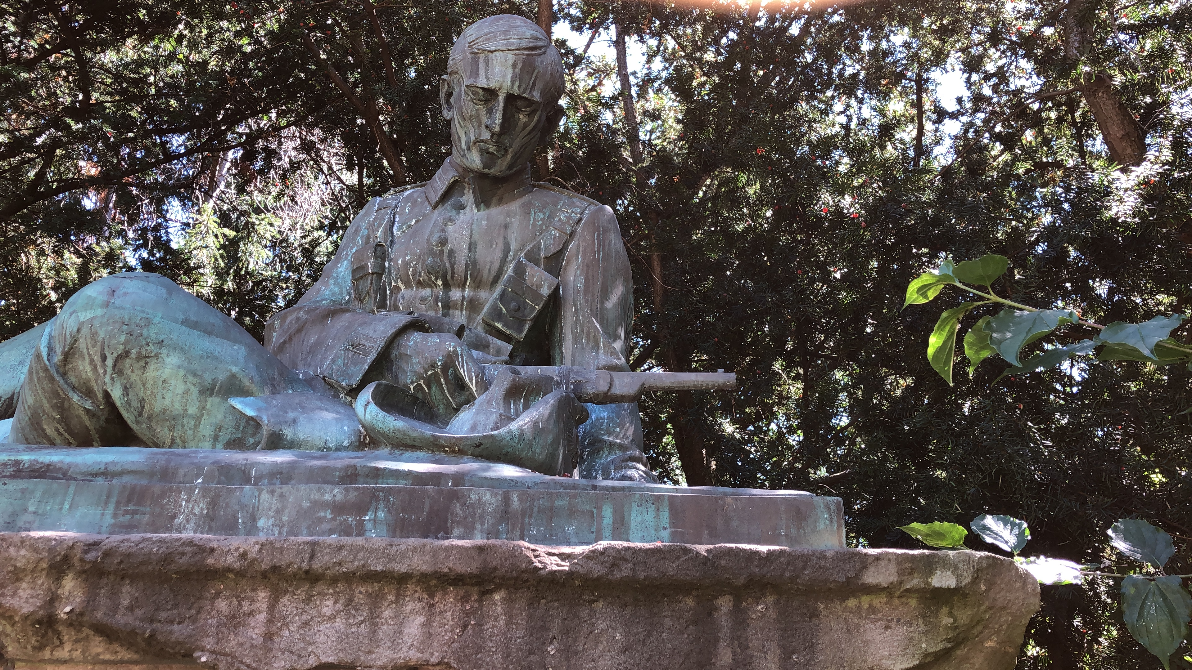 Kolonialkriegerdenkmal Düsseldorf-Derendorf, Detailansicht der Skulptur